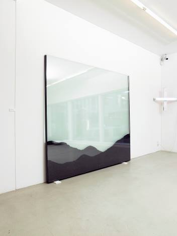 view, 2007, Lava from Hekla